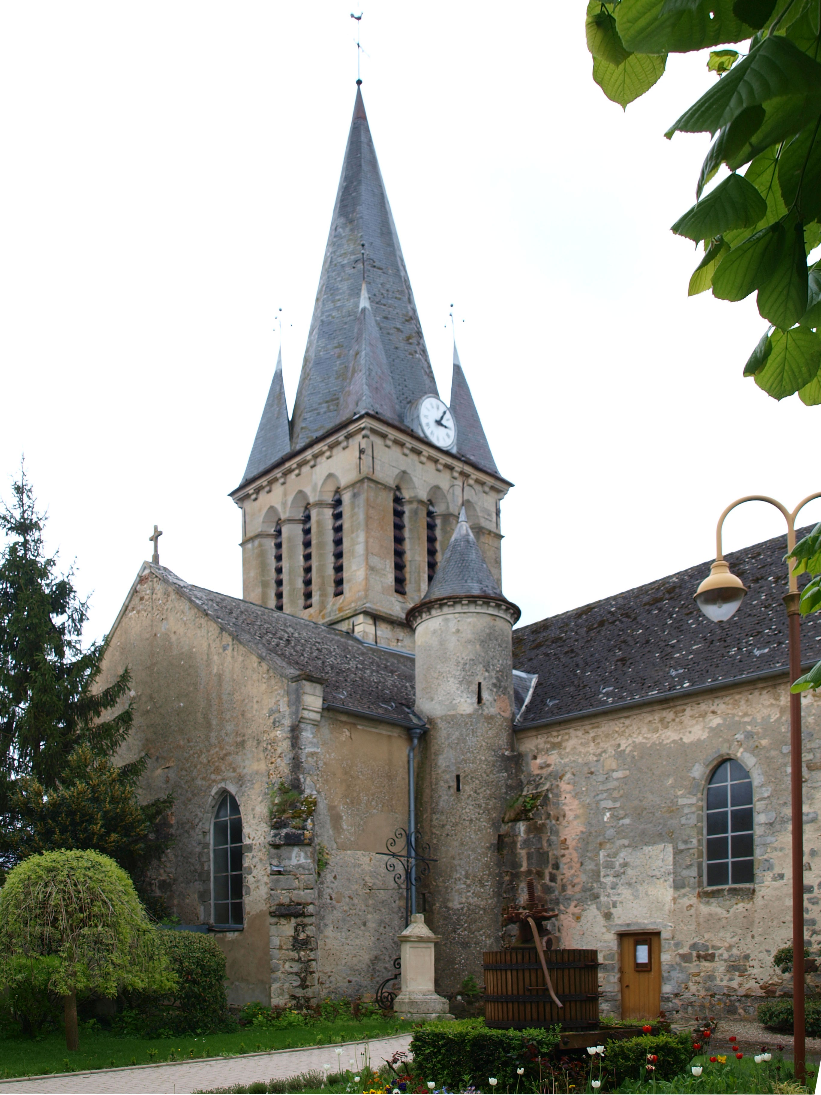 Saudoy (Marne, France) , église.